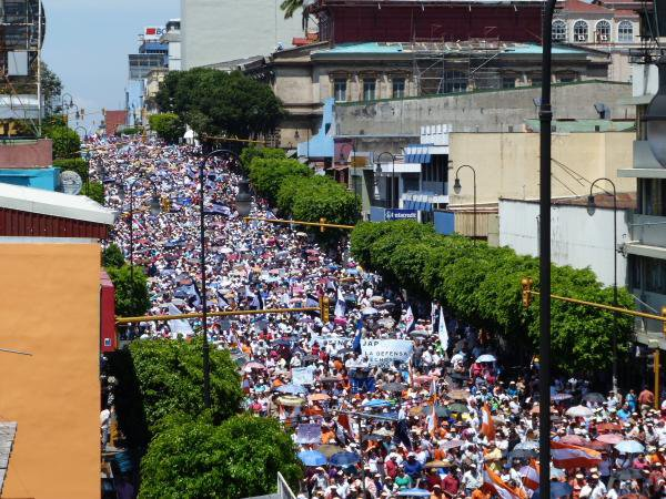 Marcha en Costa Rica